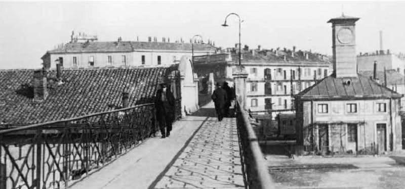 Milano, la vecchia passerella che connetteva la via Borsieri a corso Como